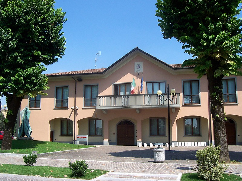 Lurano - Municipio